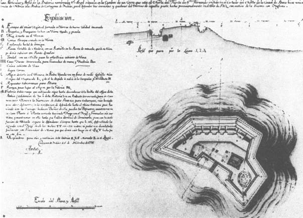 Plano realizado por Antonio de Arévalo de la batería del Ángel San Rafael, en Cartagena de Indias.